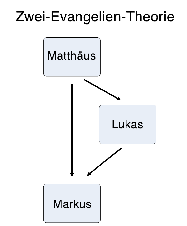 Diagramm zur Zwei-Evangelien-Theorie